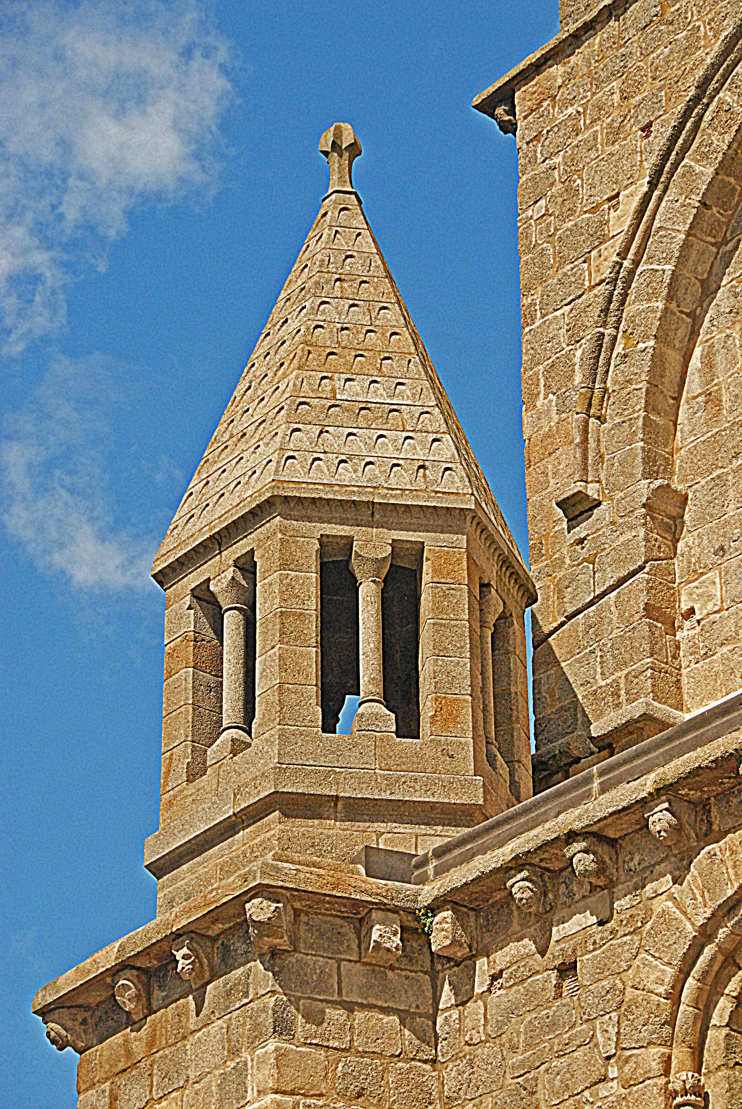 N.-D. de La Souterraine, Treppenrürmchen von SO